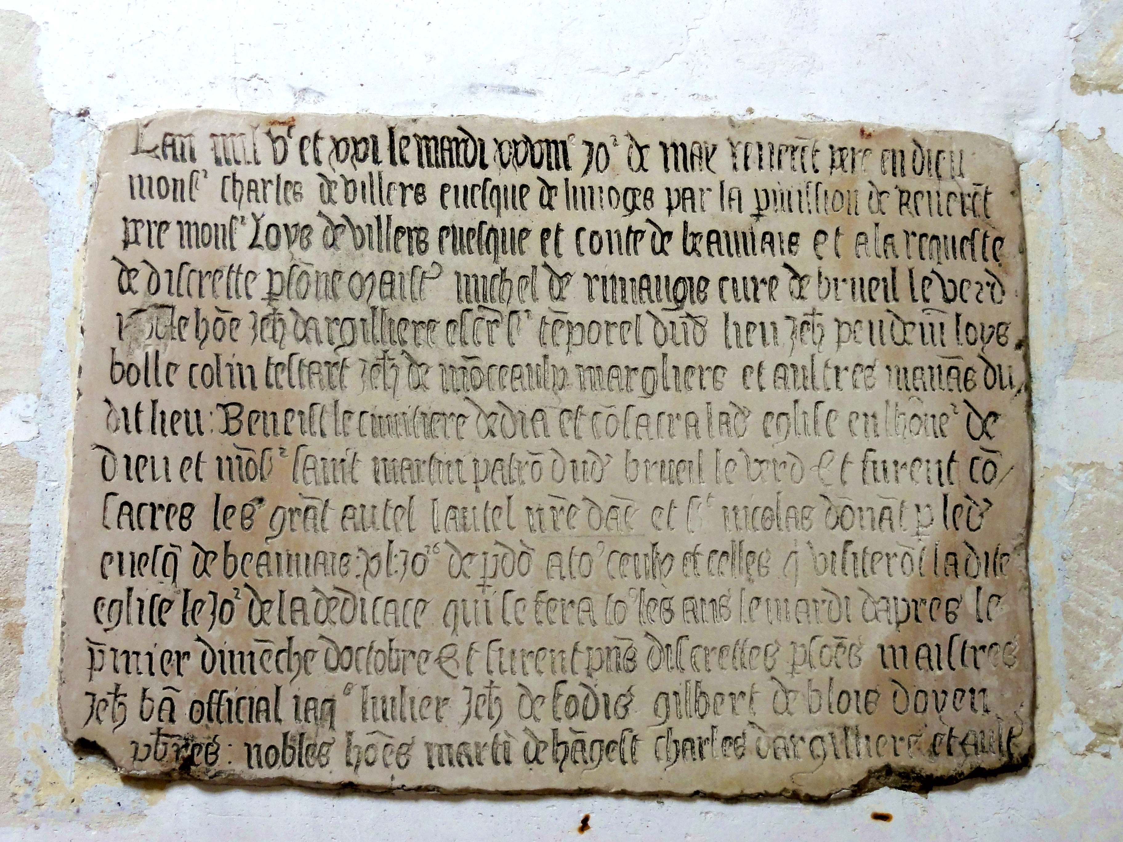 Mobilier de l'église - voir titre.